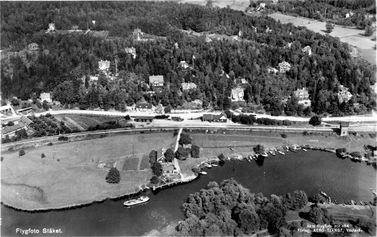 Flygbild över Stäketsundet med Stäketsholmen i förgrunden. Enköpingsvägen och järnvägen går vågrätt genom bilden. Utmed Enköpingsvägen fr v ligger Stäketsborg, Konditori & Kafe Solberga, Stäkets Lanthandel (Byxan), godsmagasinet och järnvägsstationen och pumphuset (den höga smala utmed järnvägen). Utmed sundet Stäkets krog och värdshus.